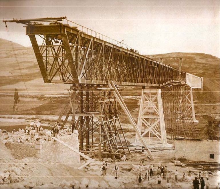 Construcción del puente de Gor, actual puente de Lata en Dúrcal, Granada.